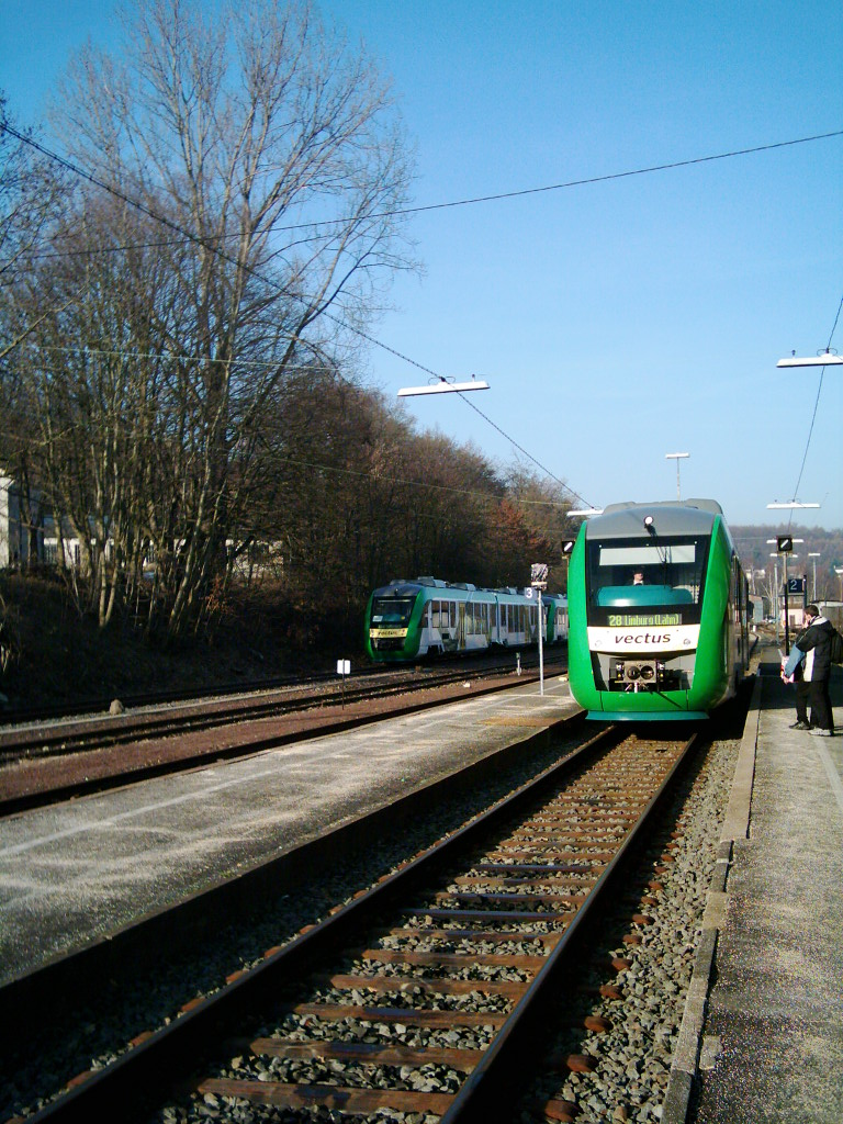 vectus Triebwagen 205 in Westerburg.